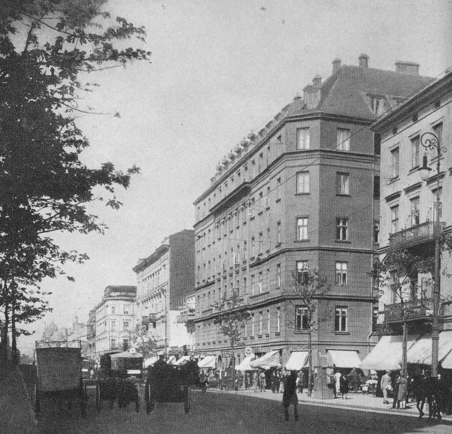 Siedziba koncernu "Siła i Światło" przy ul. Marszałkowskiej 94 (róg Nowogrodzka 30)